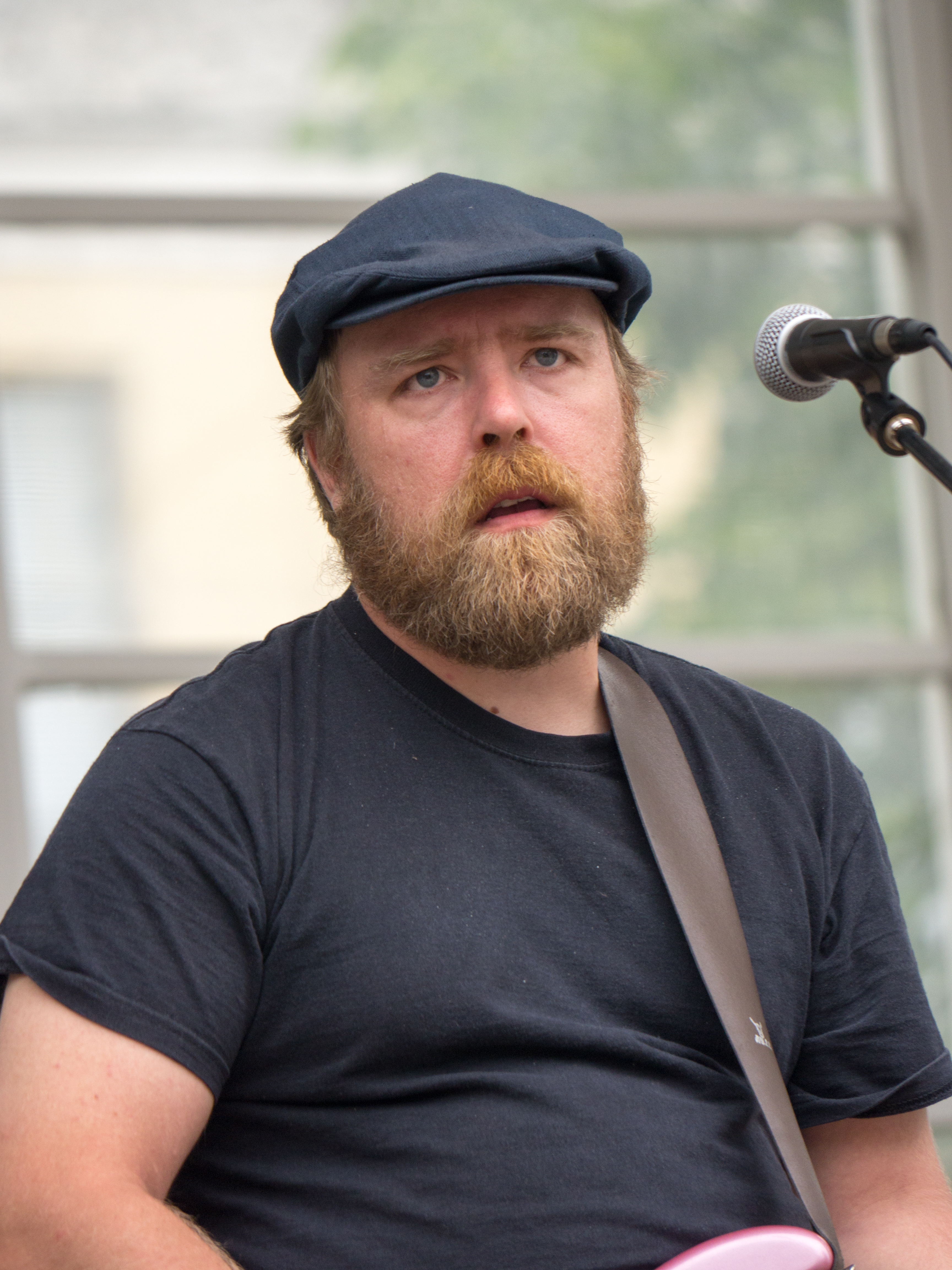 Altti Uhlenius